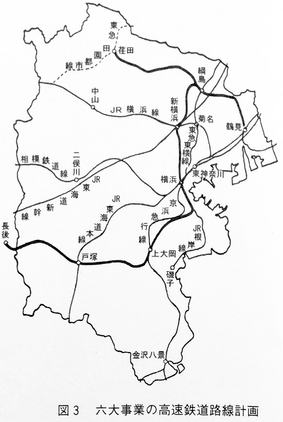 1965年10月の横浜市六大事業構想で発表された、横浜市営地下鉄建設事業の路線図。